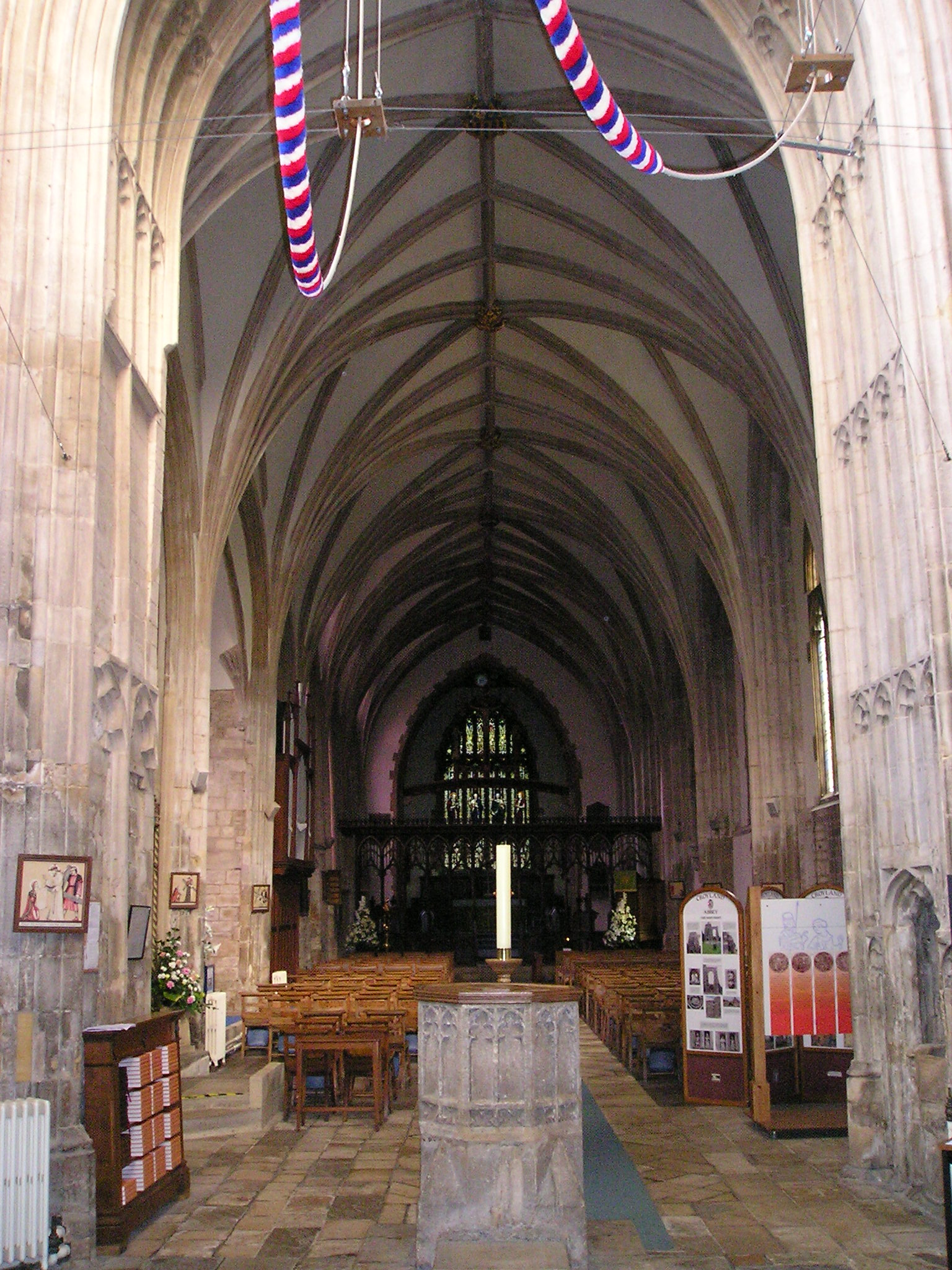 Crowland,_Croyland_Abbey,_nördliches_Seitenschiff,_heutige_Parish_Church